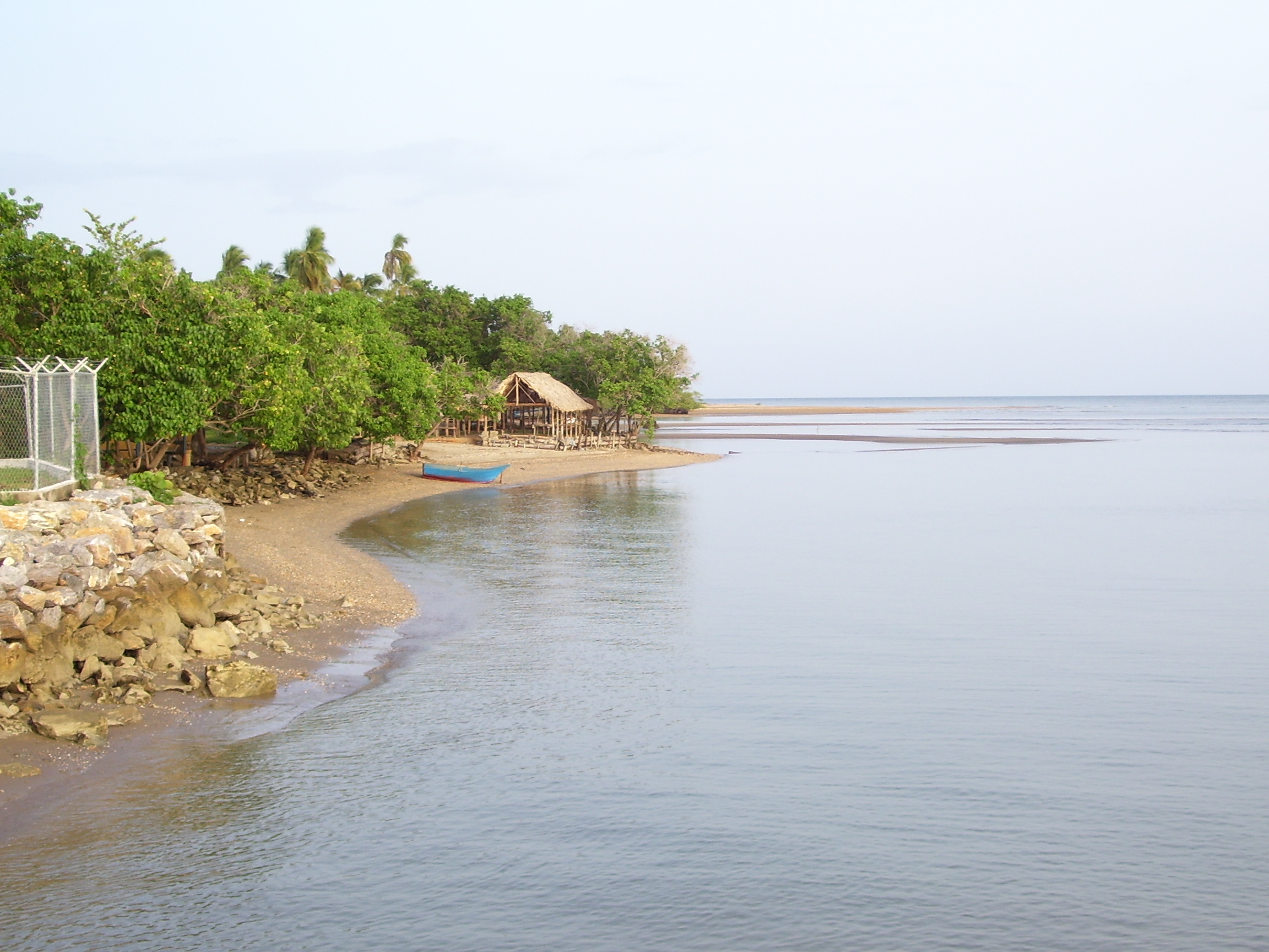 Playa de Soro conocida como "El Puerto" en el estado Sucre, Venezuela.